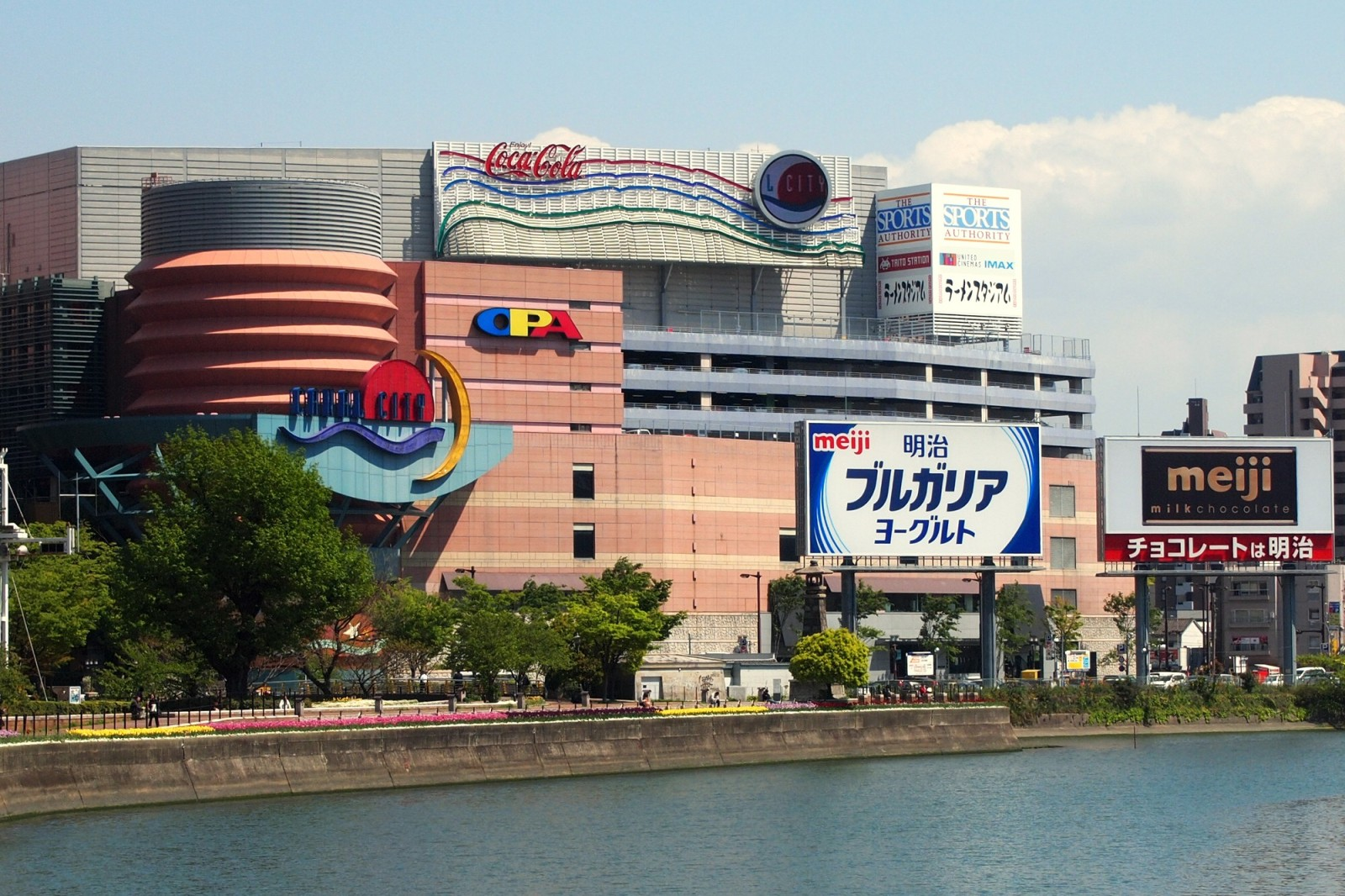 福岡県福岡市の商業施設「キャナルシティ博多」遠景